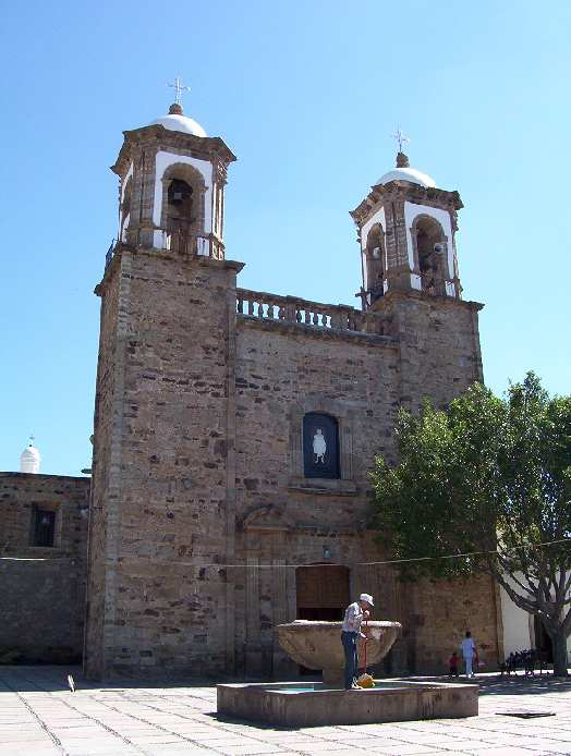 Templo de Ixtlahuacan del Rio